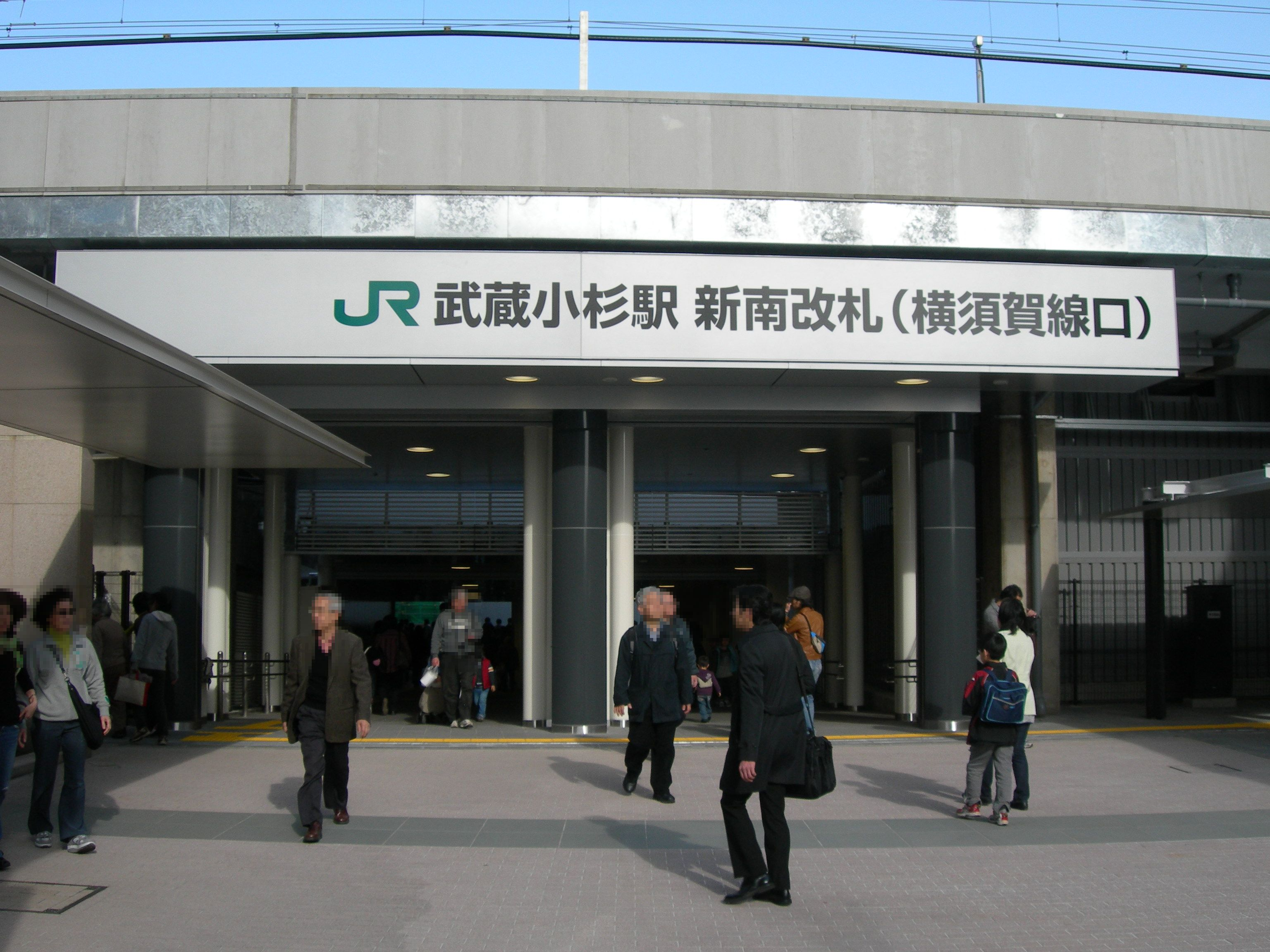 JR武蔵小杉駅新南口